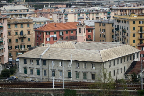 Foto di proprietà Convento S. Francesco (Bolzaneto - Genova)